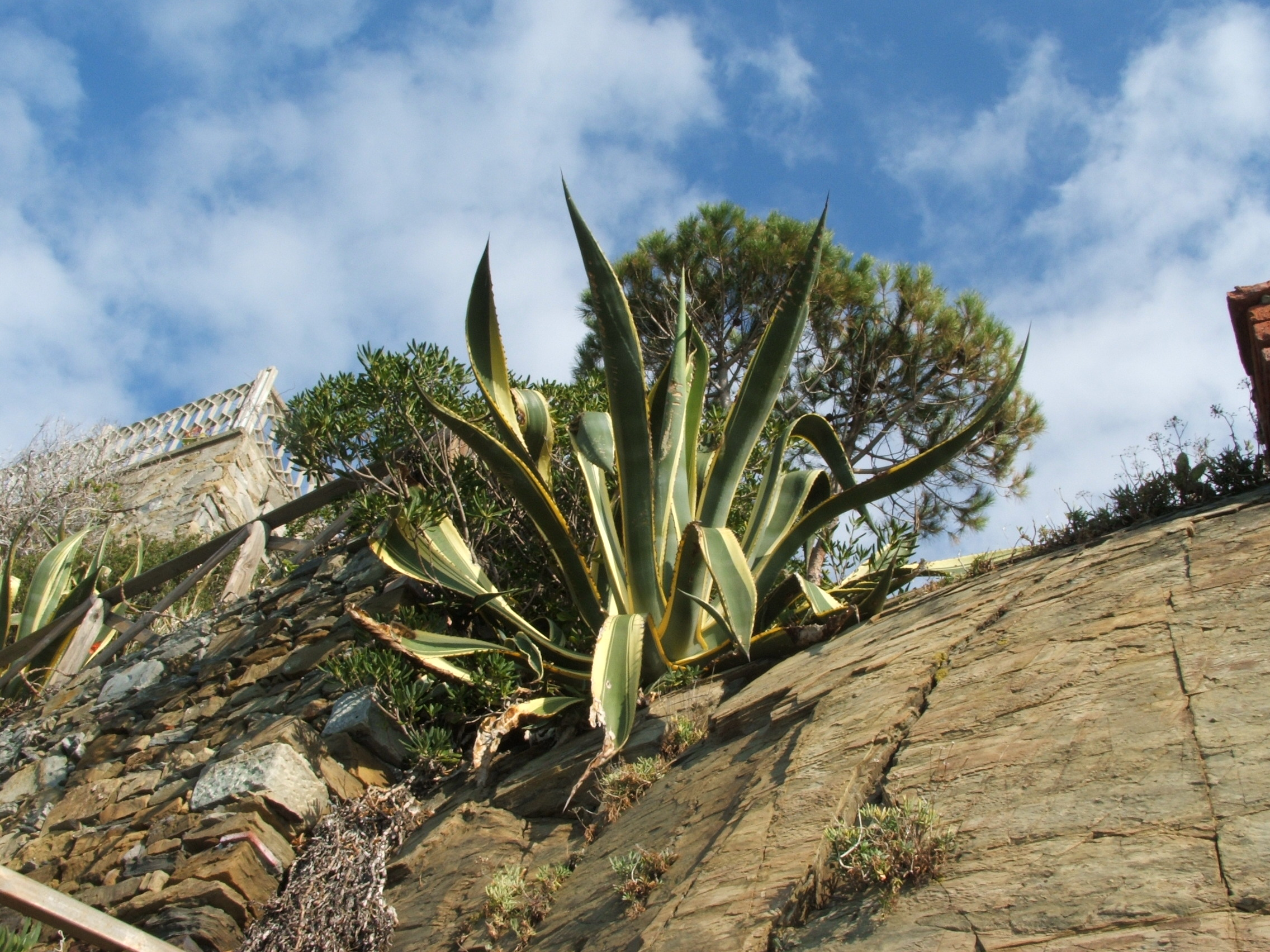 Immagine dalle Cinque Terre: Via dell'Amore Riomaggiore - vegetazione